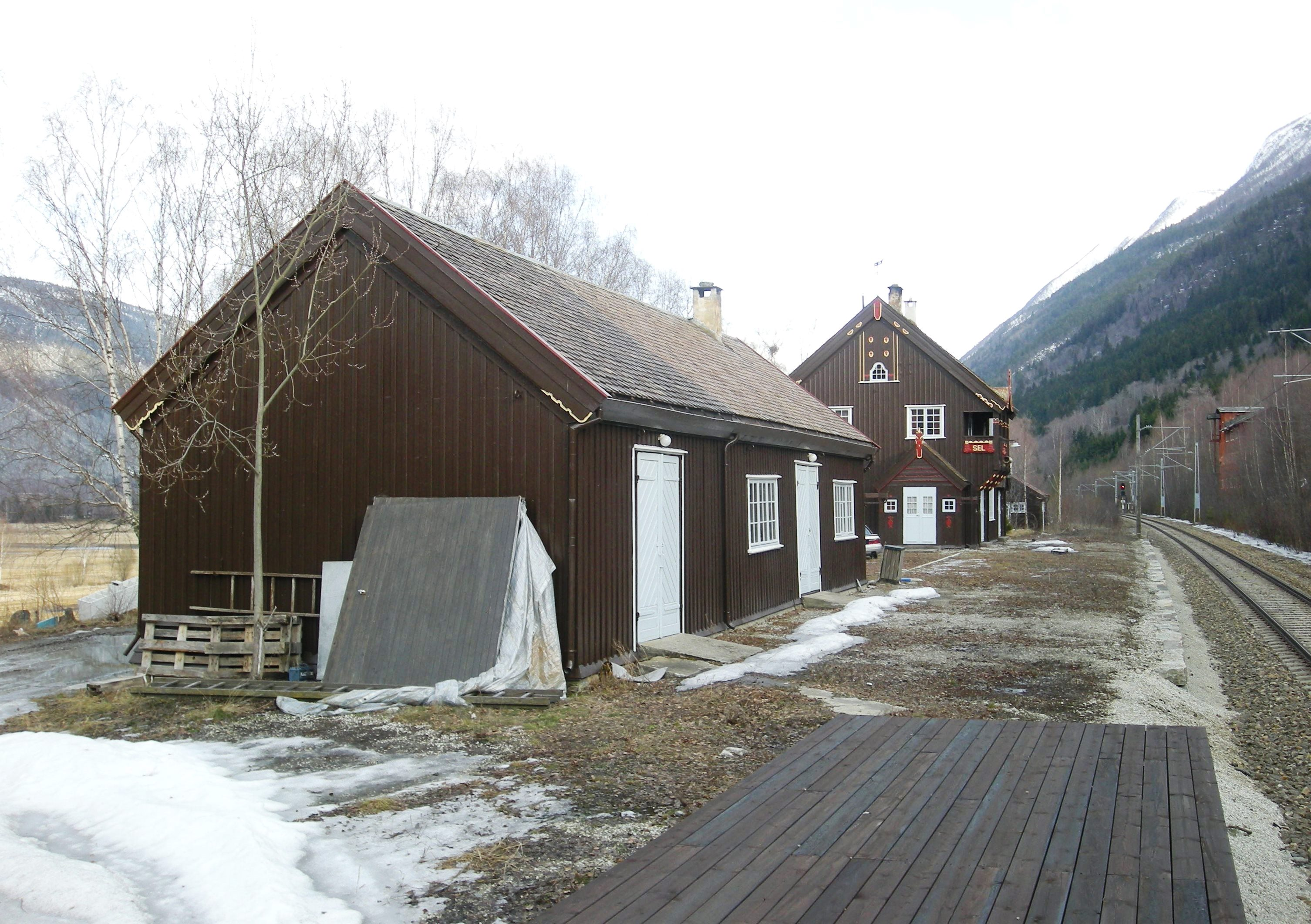 Sel stasjon på Nord-Sel